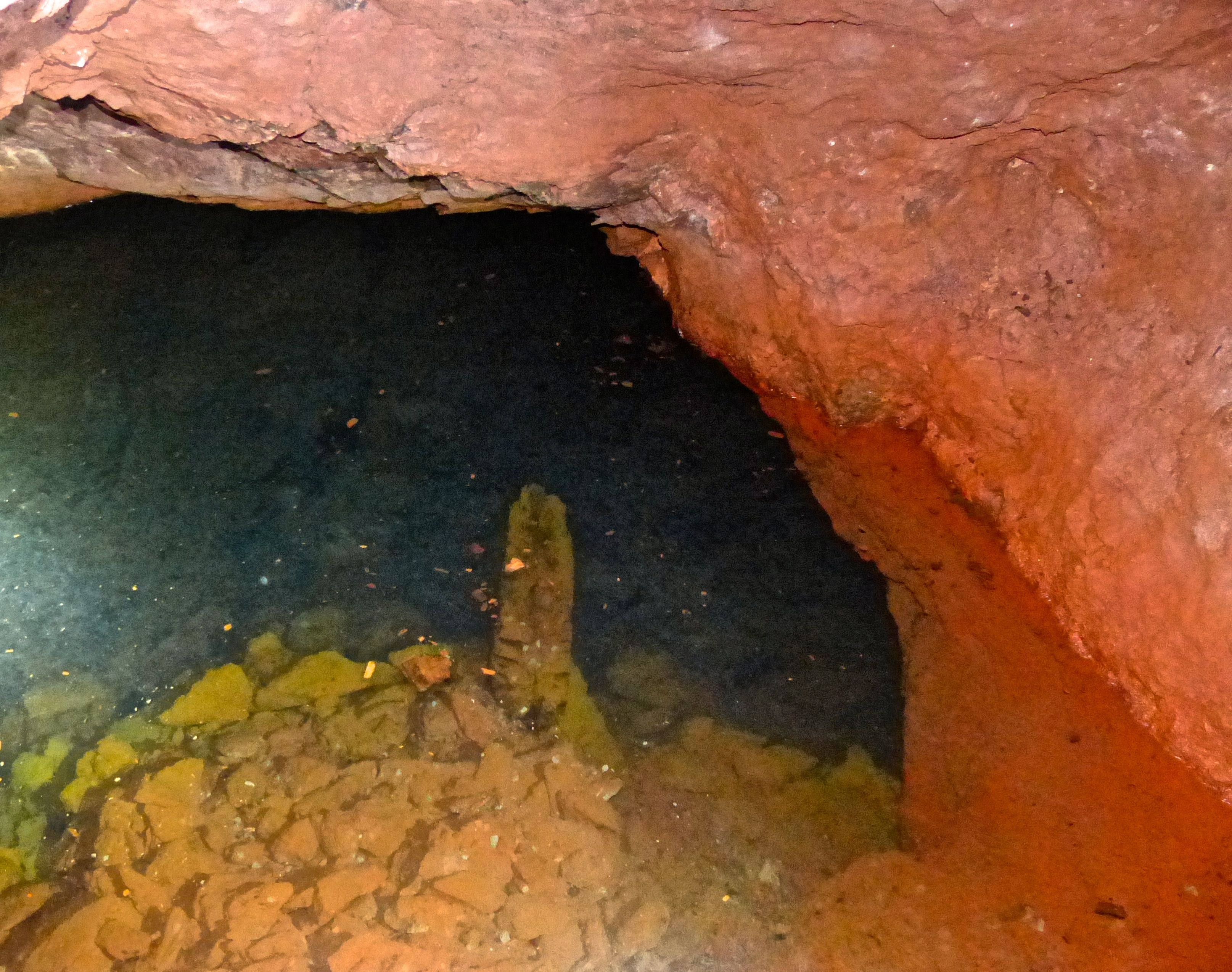 Philippstollen des Briloner Eisenberges: Abgesoffener Grubenbau